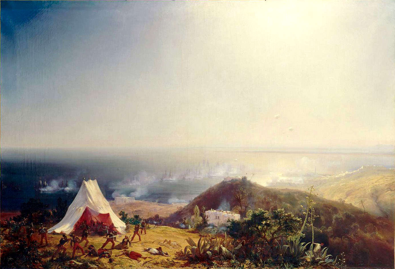 Attaque_d_Alger_par_la_mer_29_Juin_1830_par_Theodore_Gudin